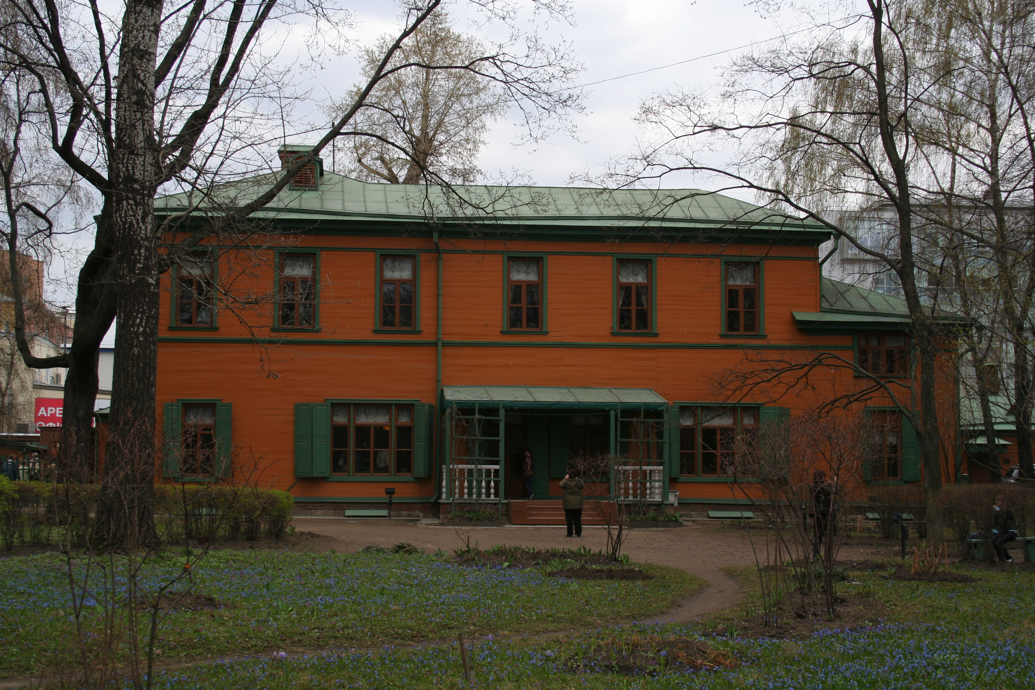 Мемориальный музей-усадьба Л. Н. Толстого «Хамовники». Приусадебный сад. Вид на дом Толстого сзади.